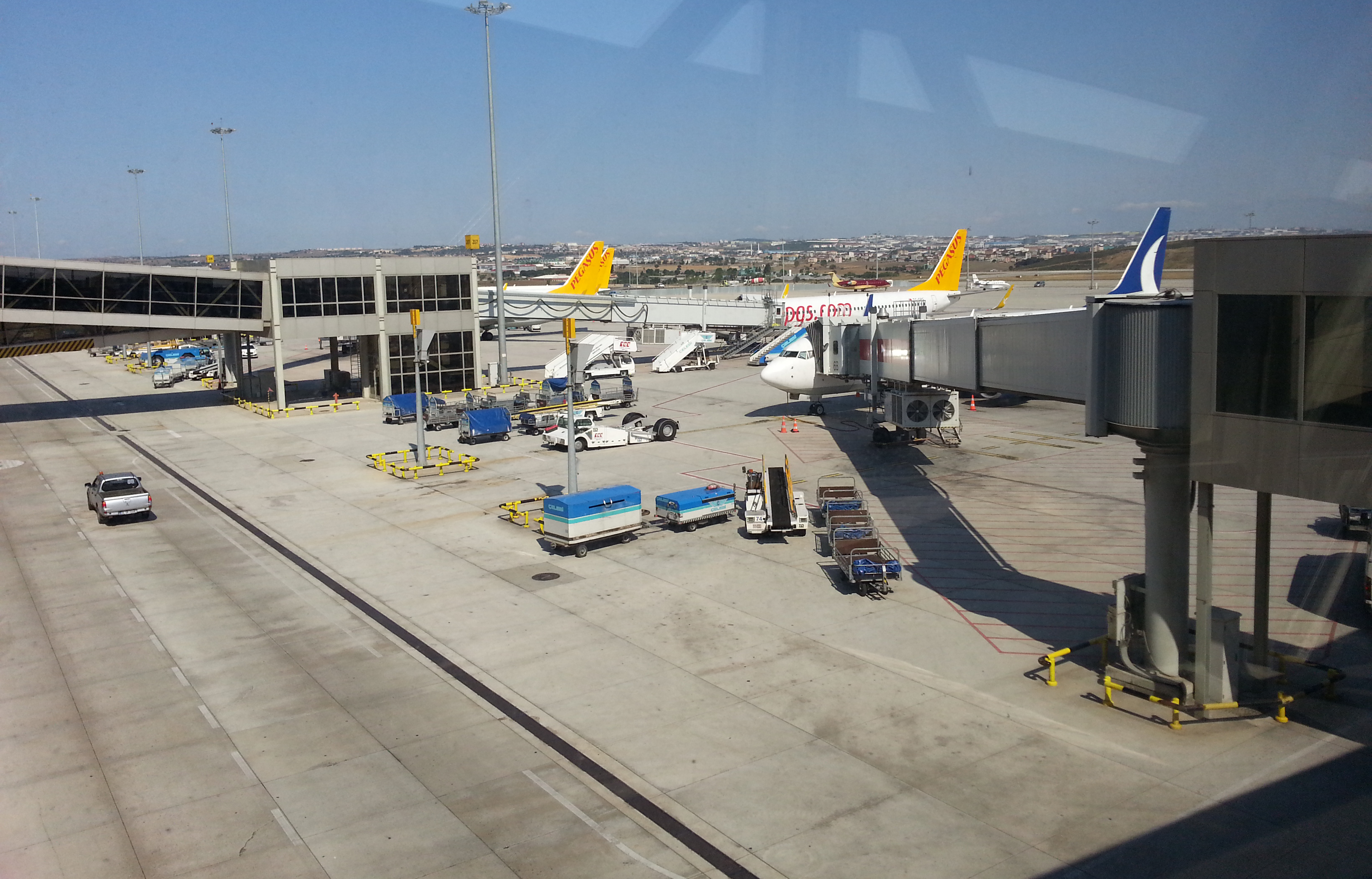 Авар: Истамбулалъул СабихIа Гёкченил цIаралда бугеб аэропорт